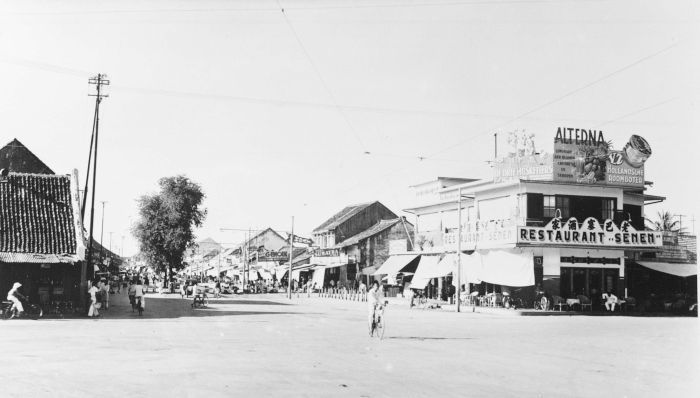 Repronegatief. Het begin van de Pasar Senen, gezien vanaf het Kramatplein. Rechts Restaurant Senen.